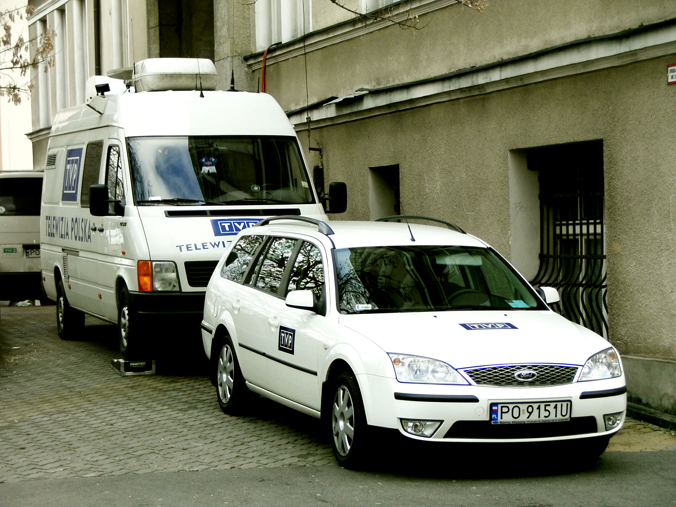 Wozy TVP oddział Poznań. Ford Mondeo i VW LT (mógł być zmontowany w firmie Volkswagen Poznań).